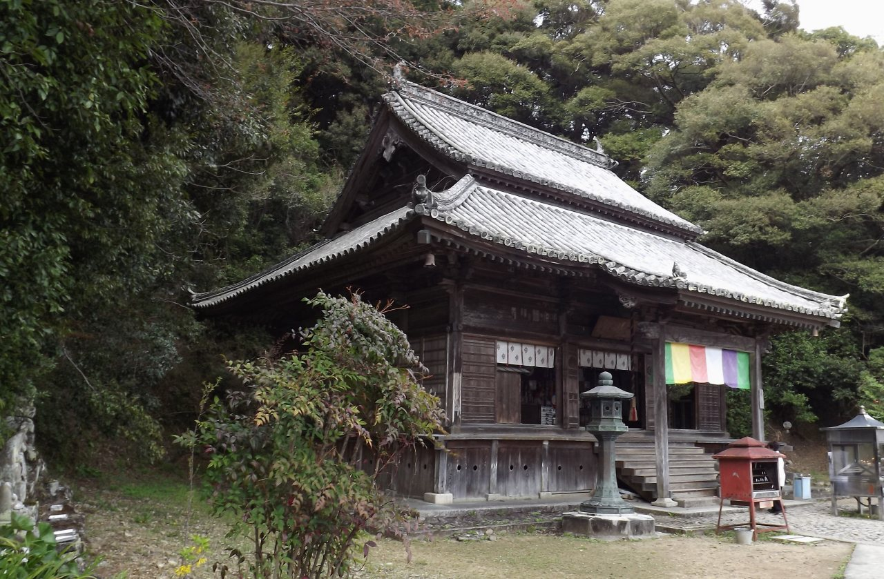 平等寺の本堂